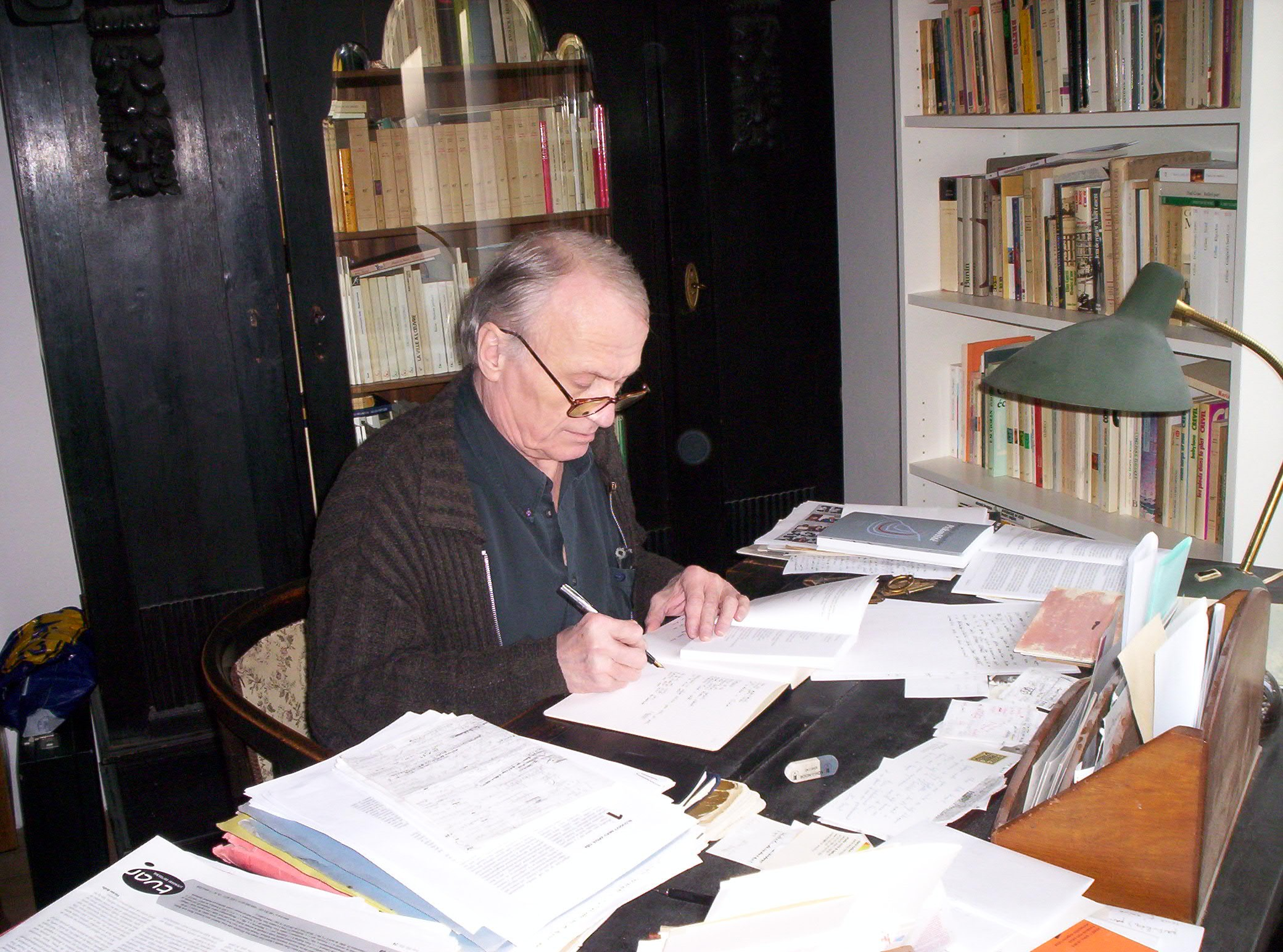 Český spisovatel Petr Král.